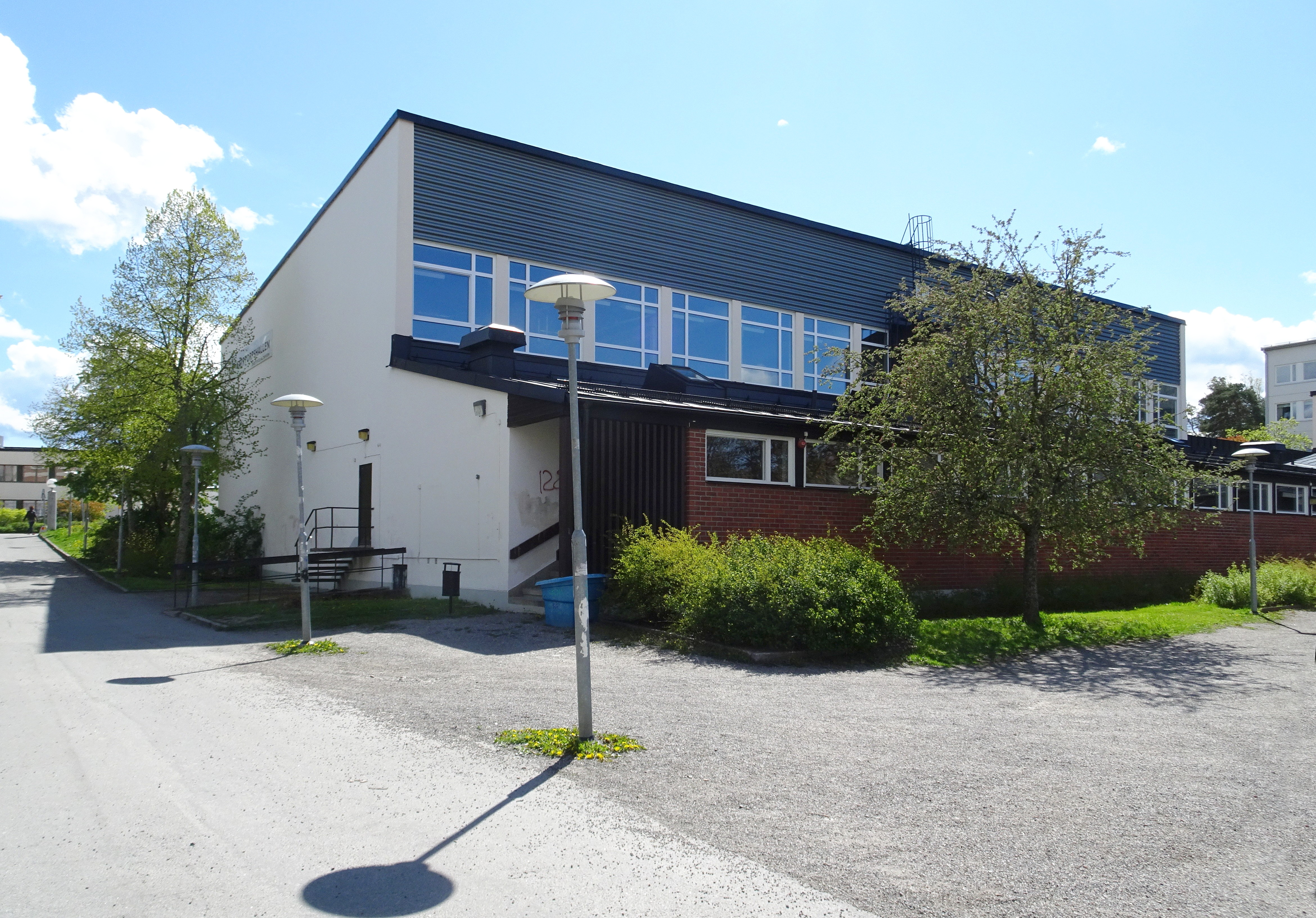 Kärrtorpshallen, byggår 1963, Bertil Rundberg (Byggmästare) Kjell Ödeen (Arkitekt) Stockholms Folkskoledirektion (Byggherre)